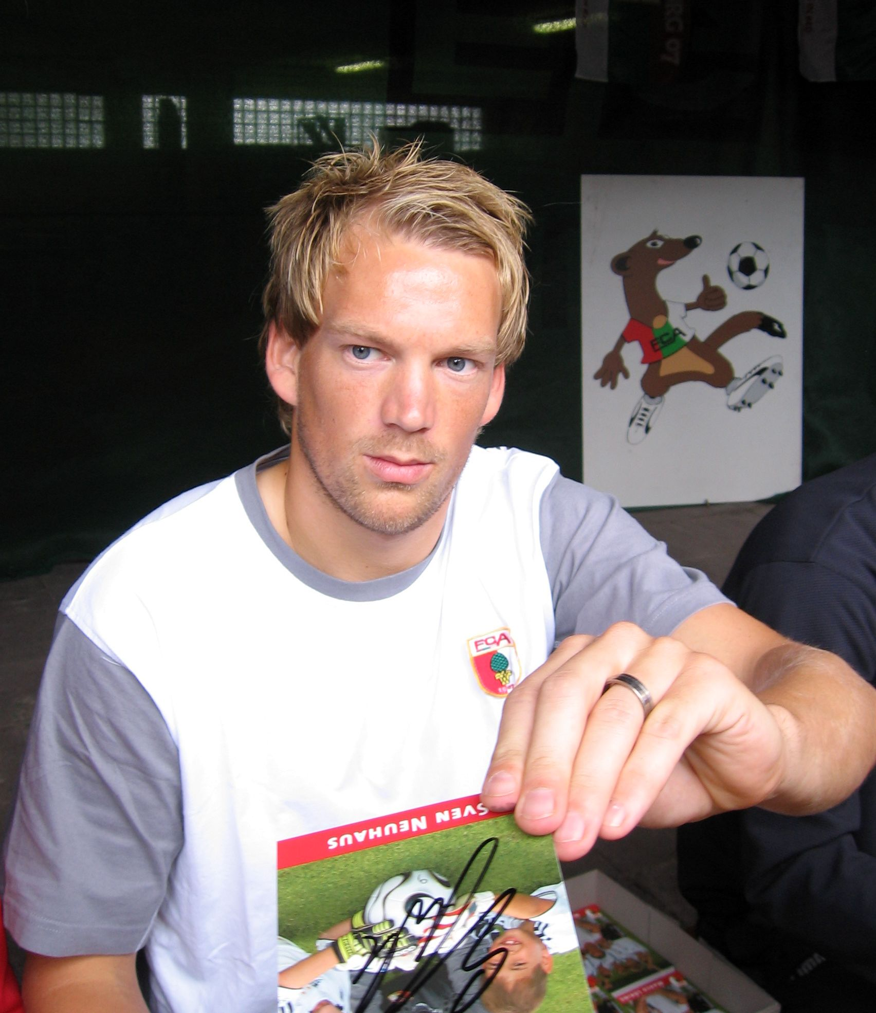 Sven Neuhaus